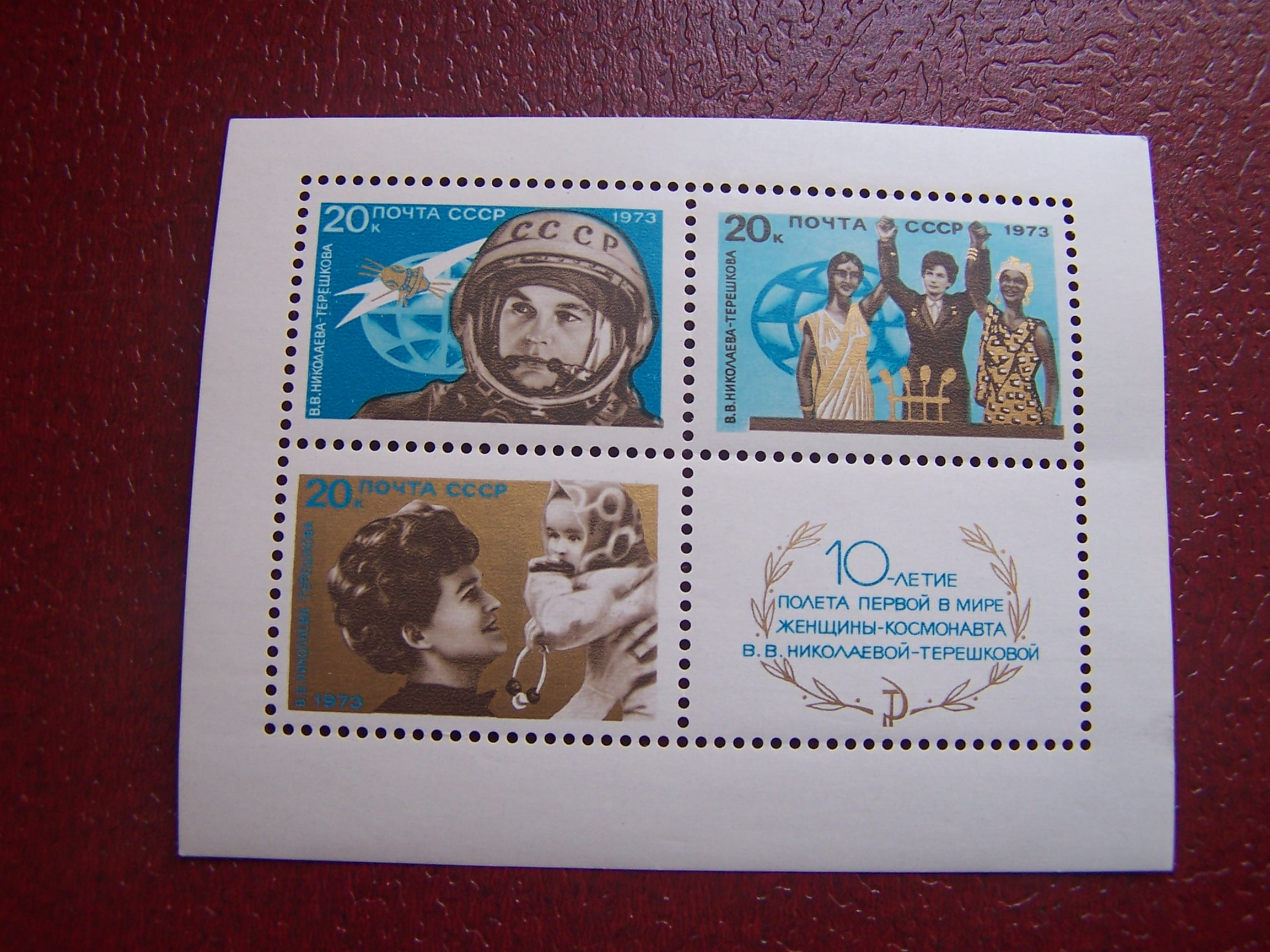 Sello URSS - 1973, primera mujer cosmonauta